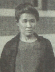 Michi Matsuda (Japanese, *1868, †1956)